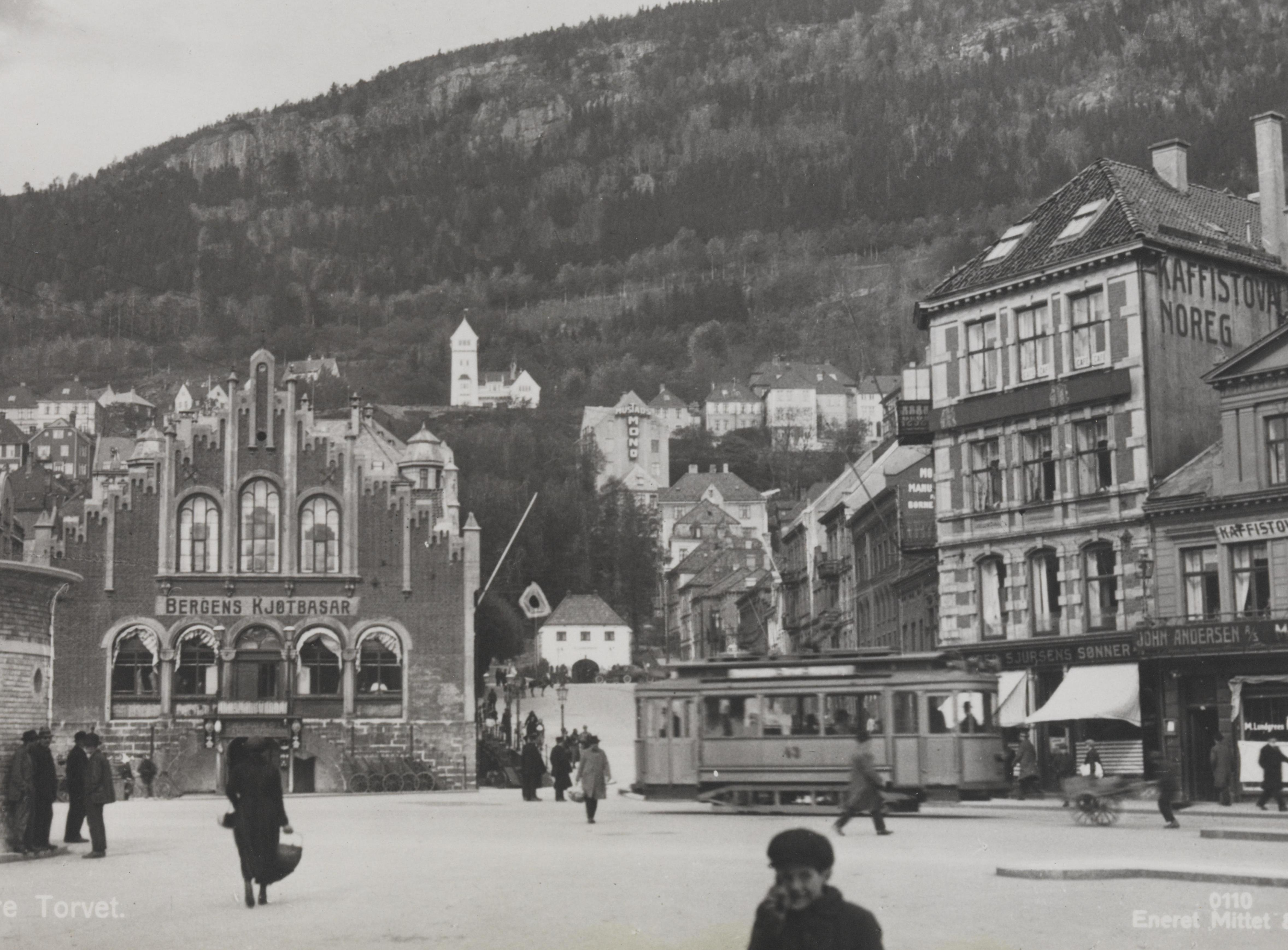 Bildet er hentet fra Nasjonalbibliotekets bildesamling Torget